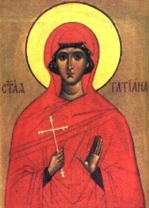 St. Tatiana